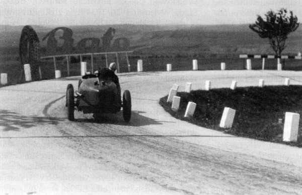 Závodní vůz v zatáčkých Masarykova okruhu nad Ostrovačicemi v 1. polovině 30. let 20. století